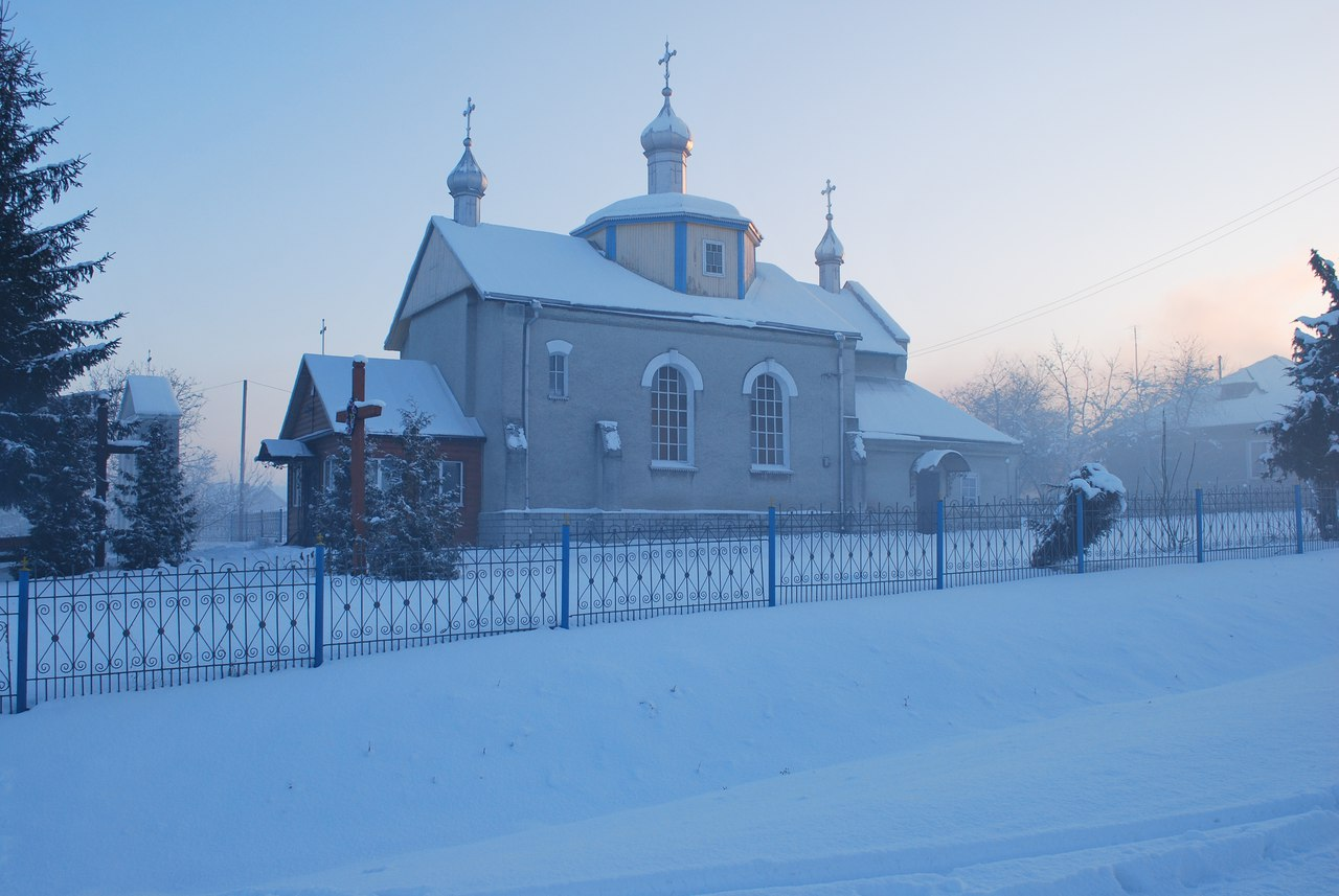 Фотографія греко-католицької церкви Перенесення мощів св. Миколи у с. Войславичі